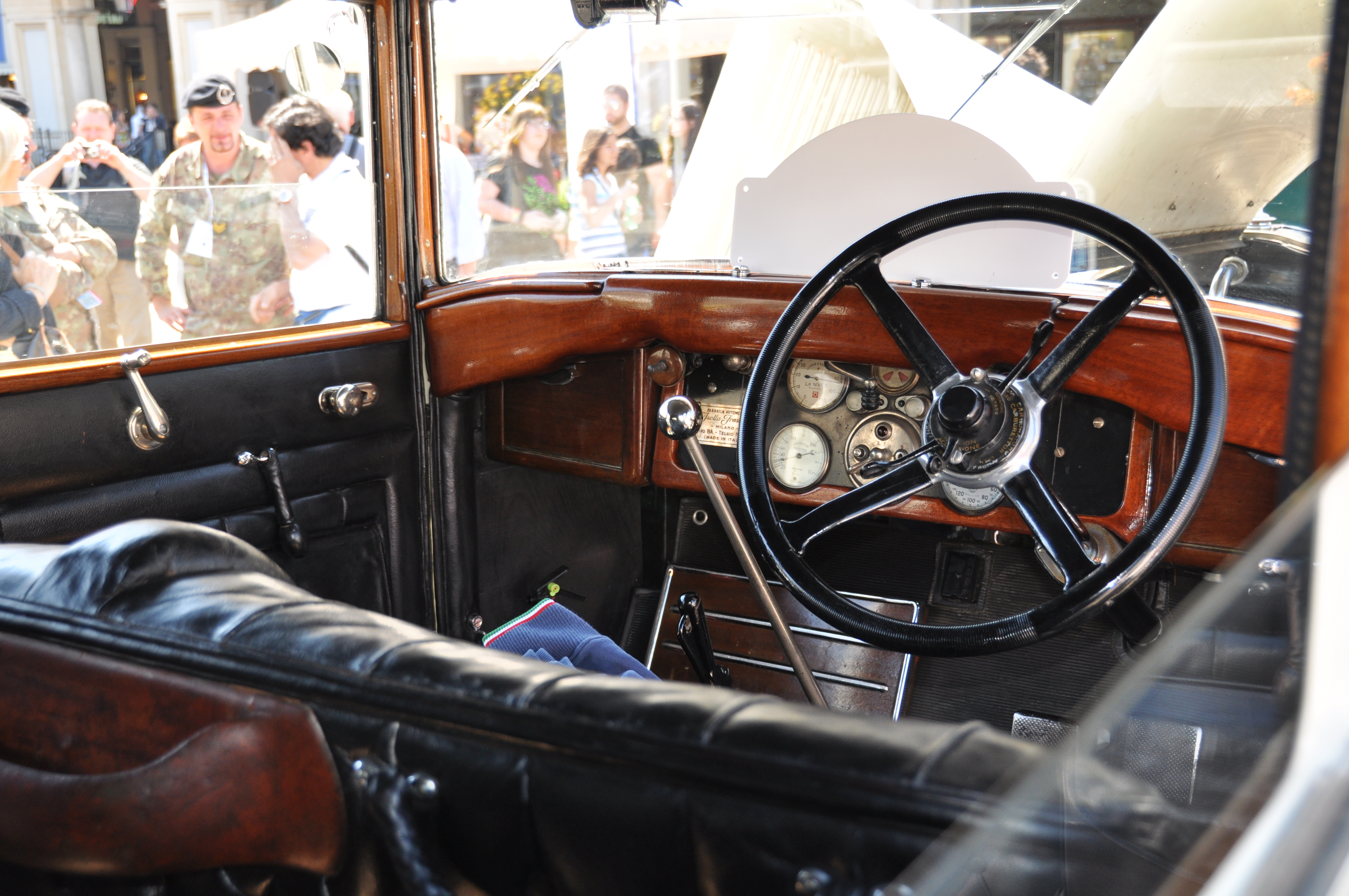 1927 Isotta Fraschini 8A Vintage cars (Le residenze sabaude)